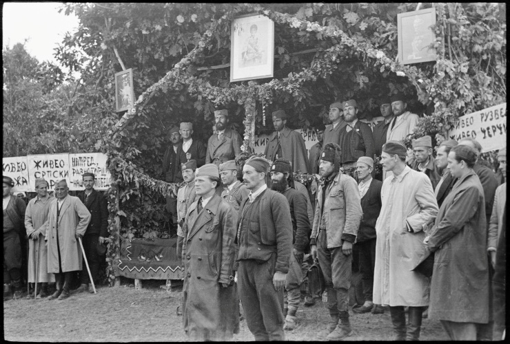 Капетан Предраг Раковић говори на заклетви у Вујетинцима у околини Чачка 1942. године. Са његове десне стране је мајор Трифун Ћосић, помоћник команданта корпуса. Доле, у првом плану (кожни мантил) стоји поручник Радиша Чековић, командант Љубићке бригаде